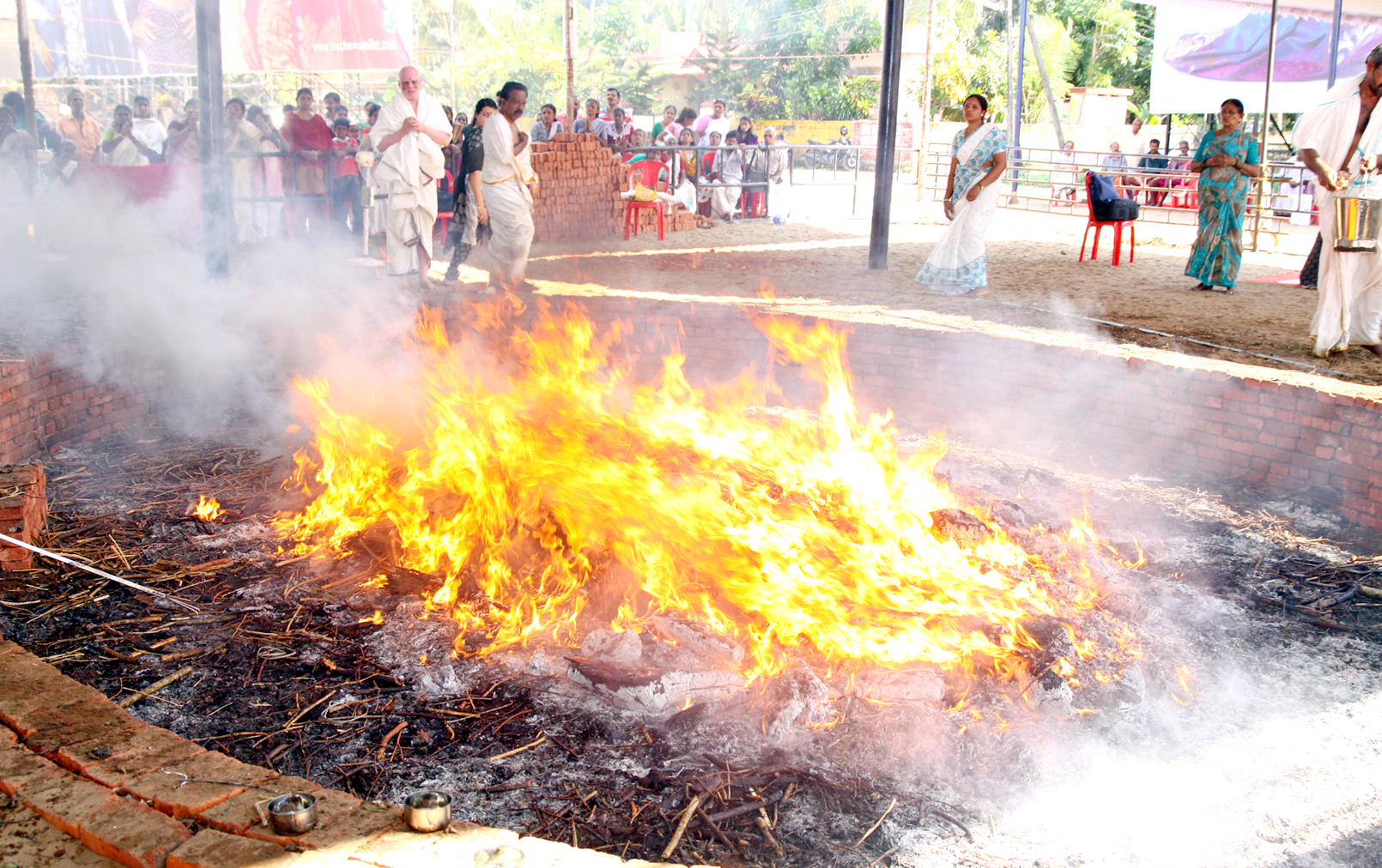 MAHAYAJNAKUNDA of Bhaishajya Maha Yagam